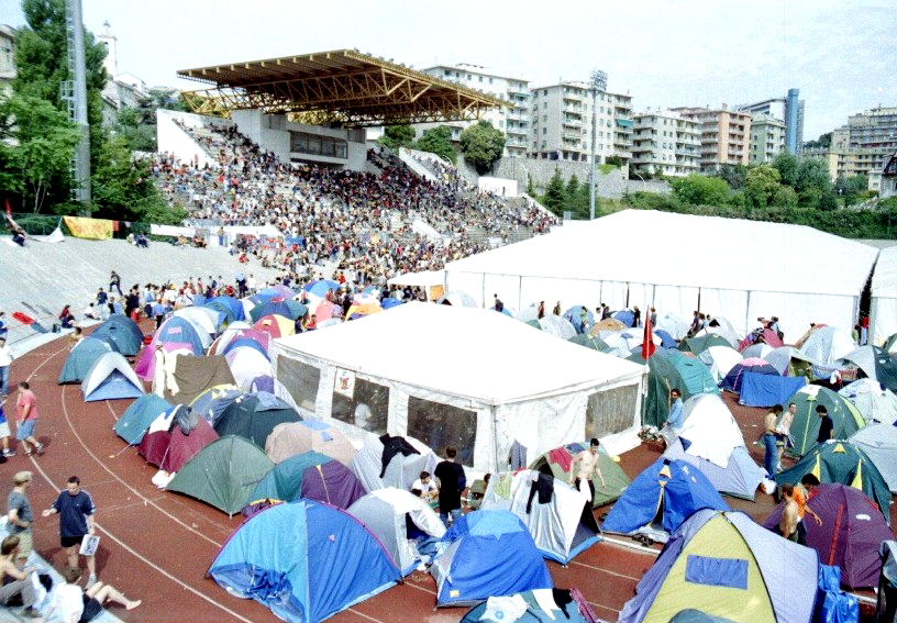 Riunione del G8 a Genova, luglio 2001 - No global a raduno allo stadio Carlini